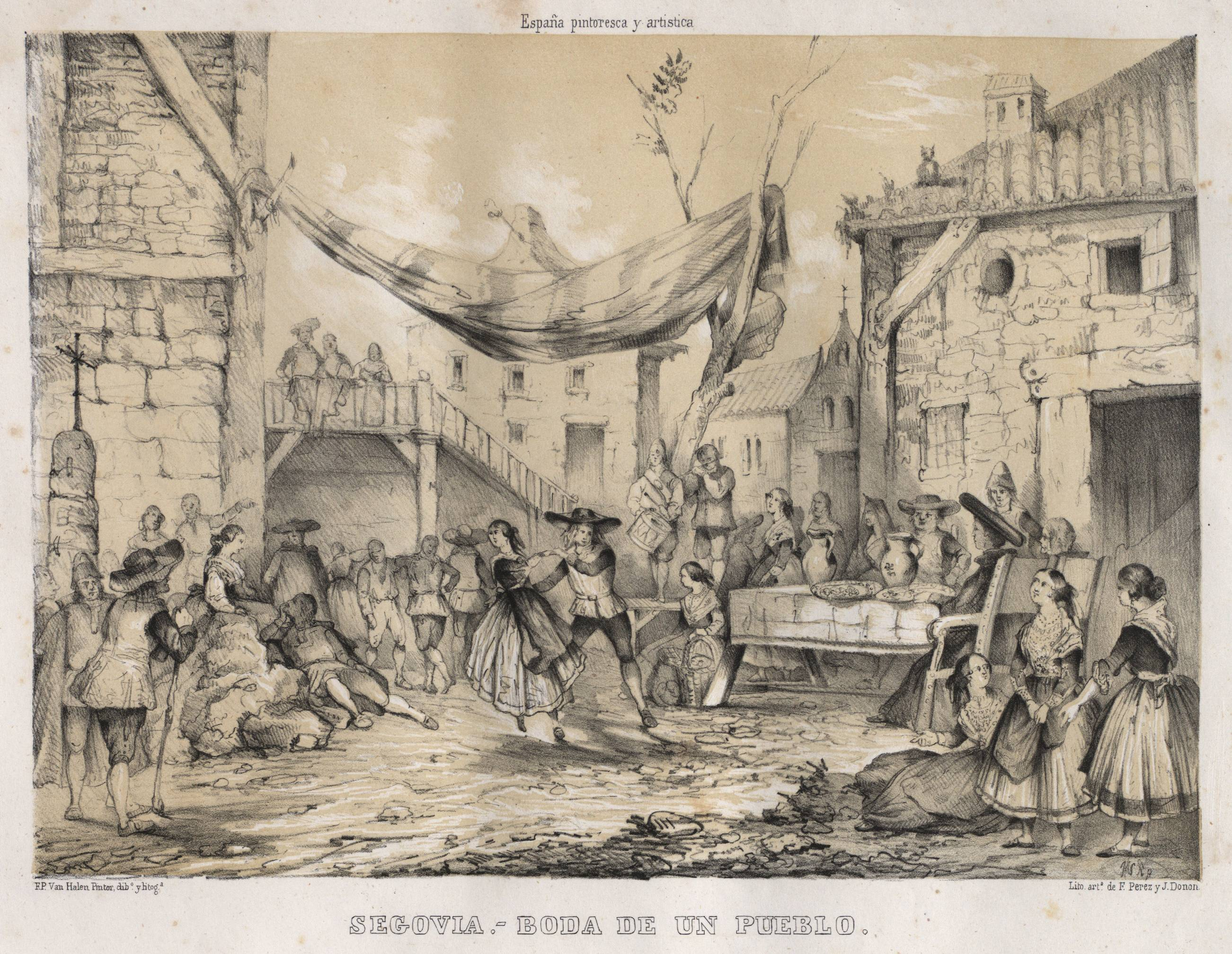 Segovia [Material gráfico]: boda de un pueblo / F. P. Van Halen, dibº y litogº.